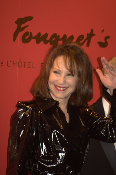 Nathalie Baye à la cérémonie des César du cinéma